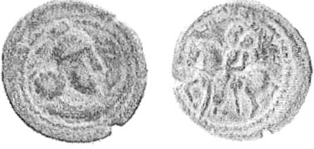 Moeda de bronze de Sapor I cunhada em Marve. Nela Sapor aparece sobre um cavalo.